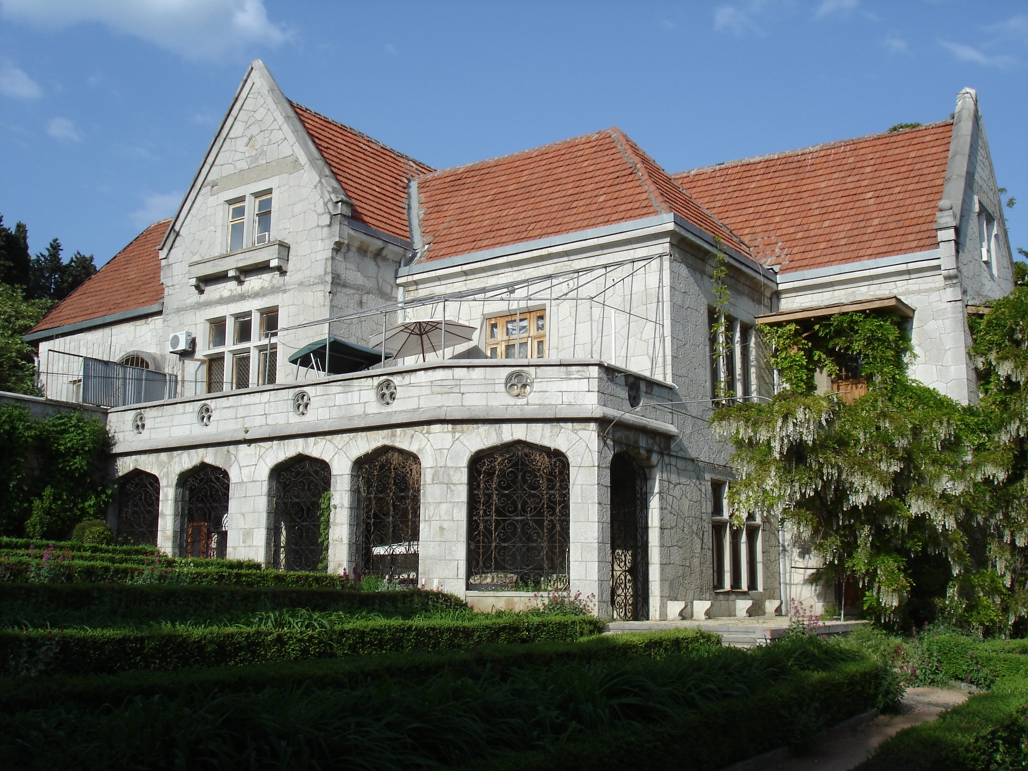 Дворец Харакс, Крым